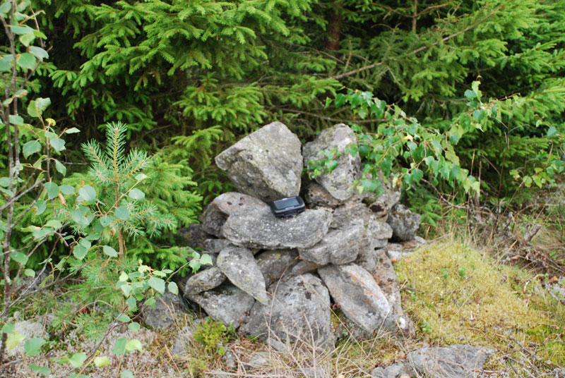 Farlighögen. Högsta punkten i Tanums kommun, Sverige